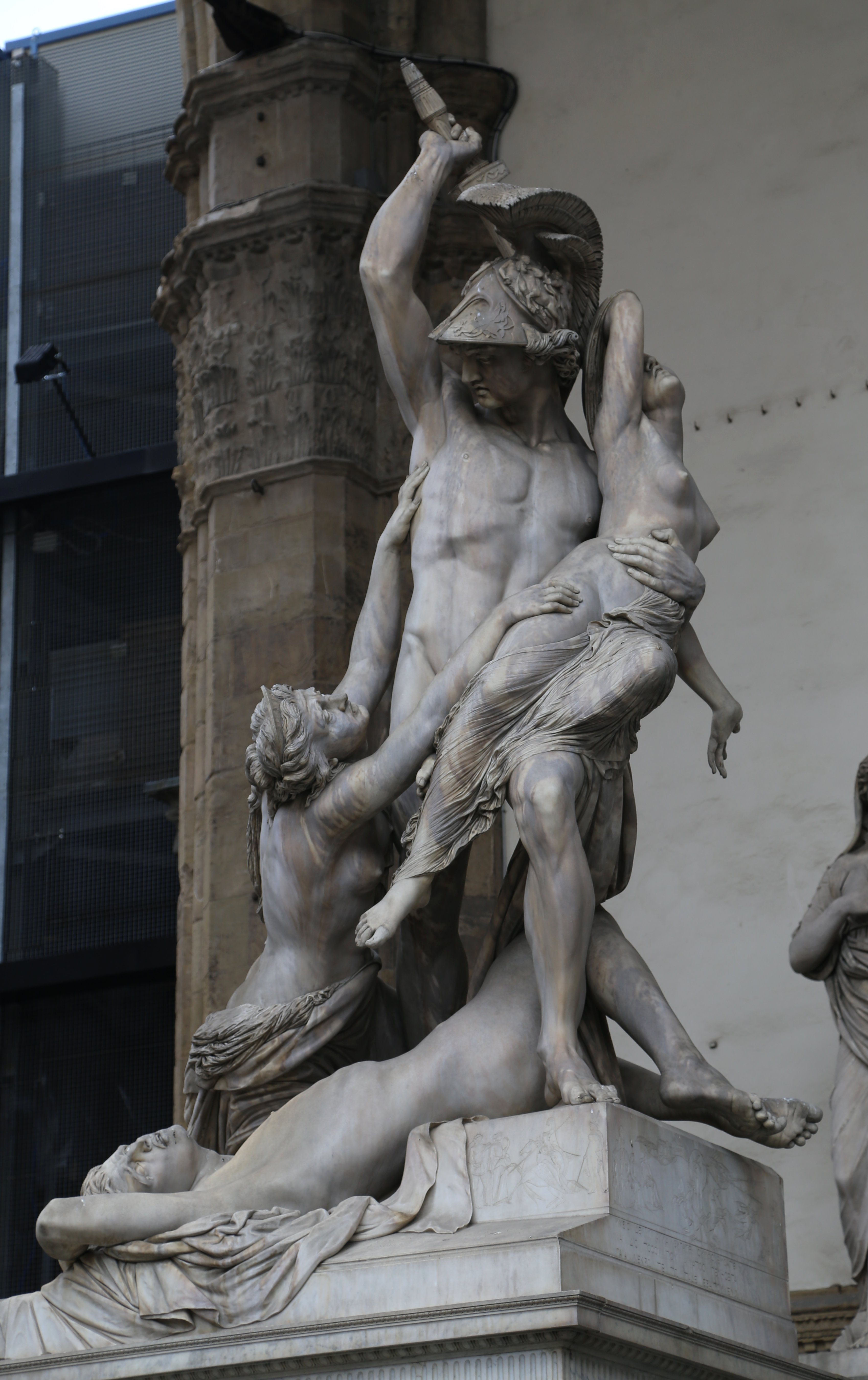 Polyxena, Pio Fedi, Loggia dei Lanzi, Florenz